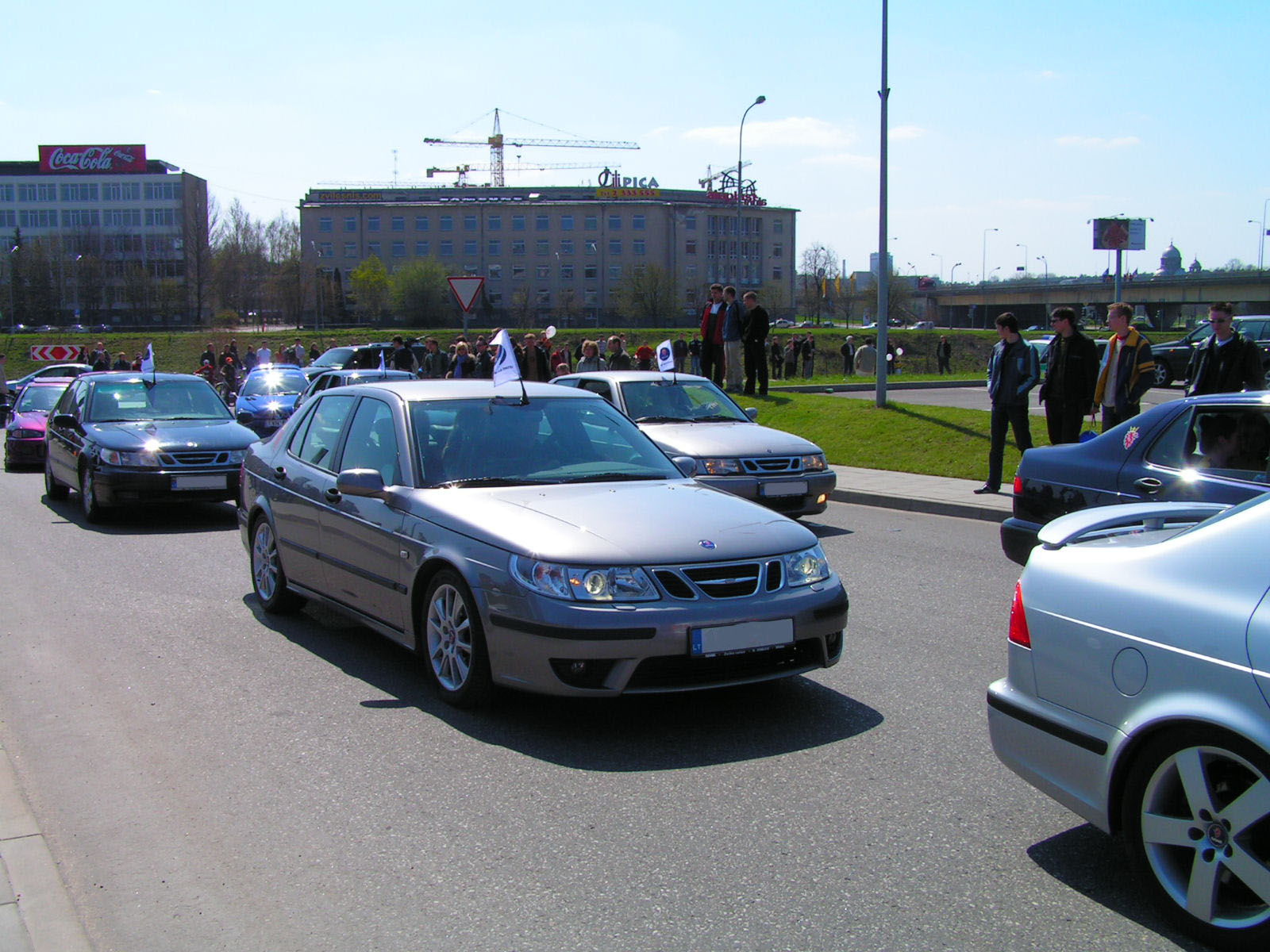 Saab 9-5 MY2002-2006 2005 metų parade.